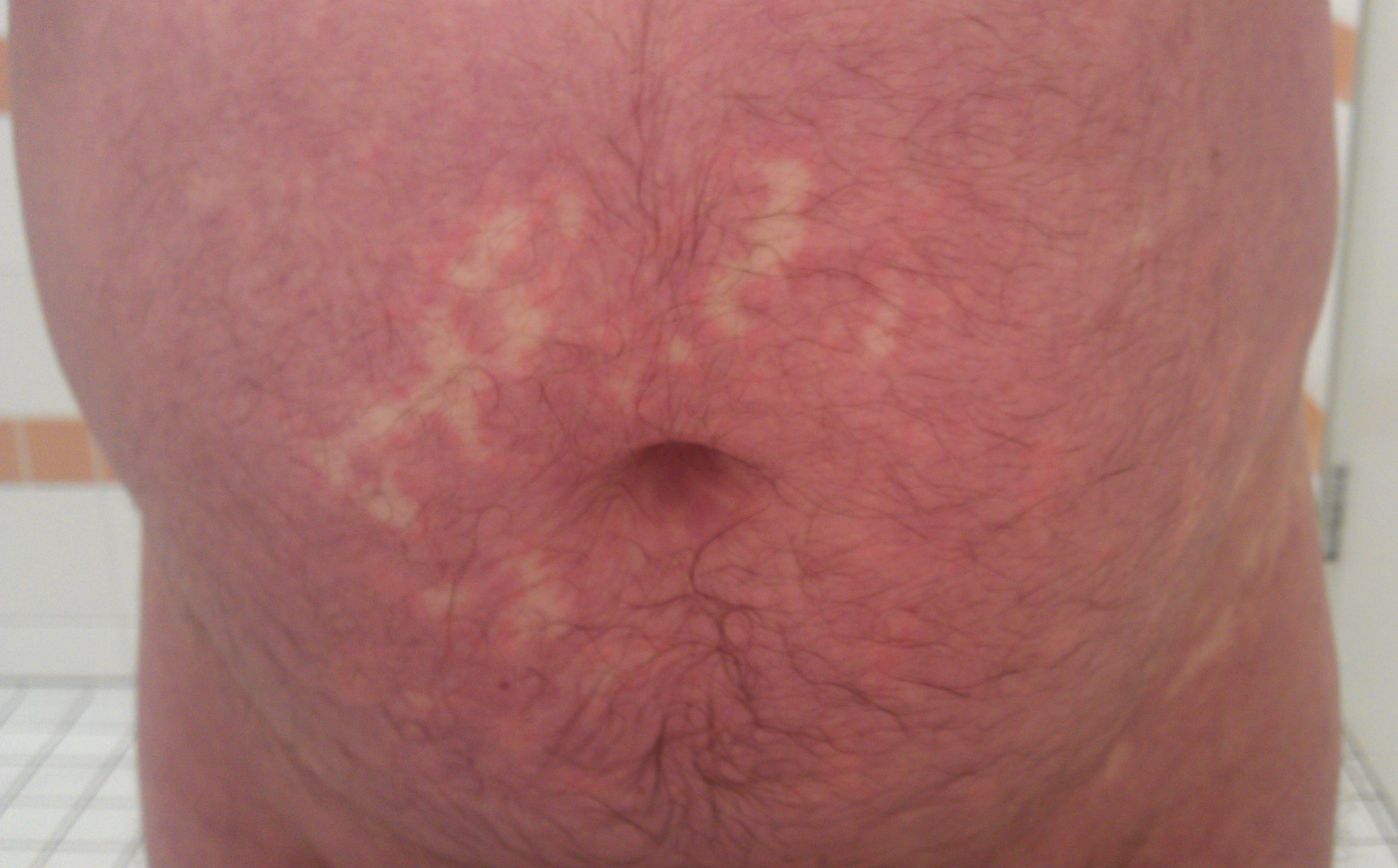 Krankheitsbild Verdacht auf Amoxicillin Exanthem. Verlauf Stunde 107h.